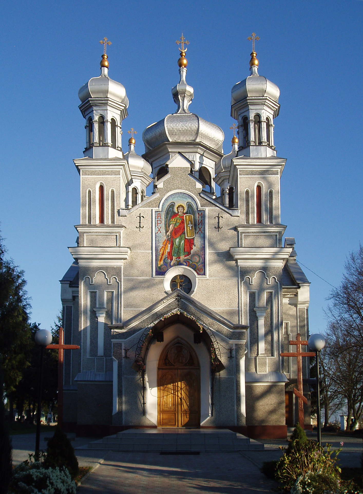 Церква в селі Рудники Миколаївського району.